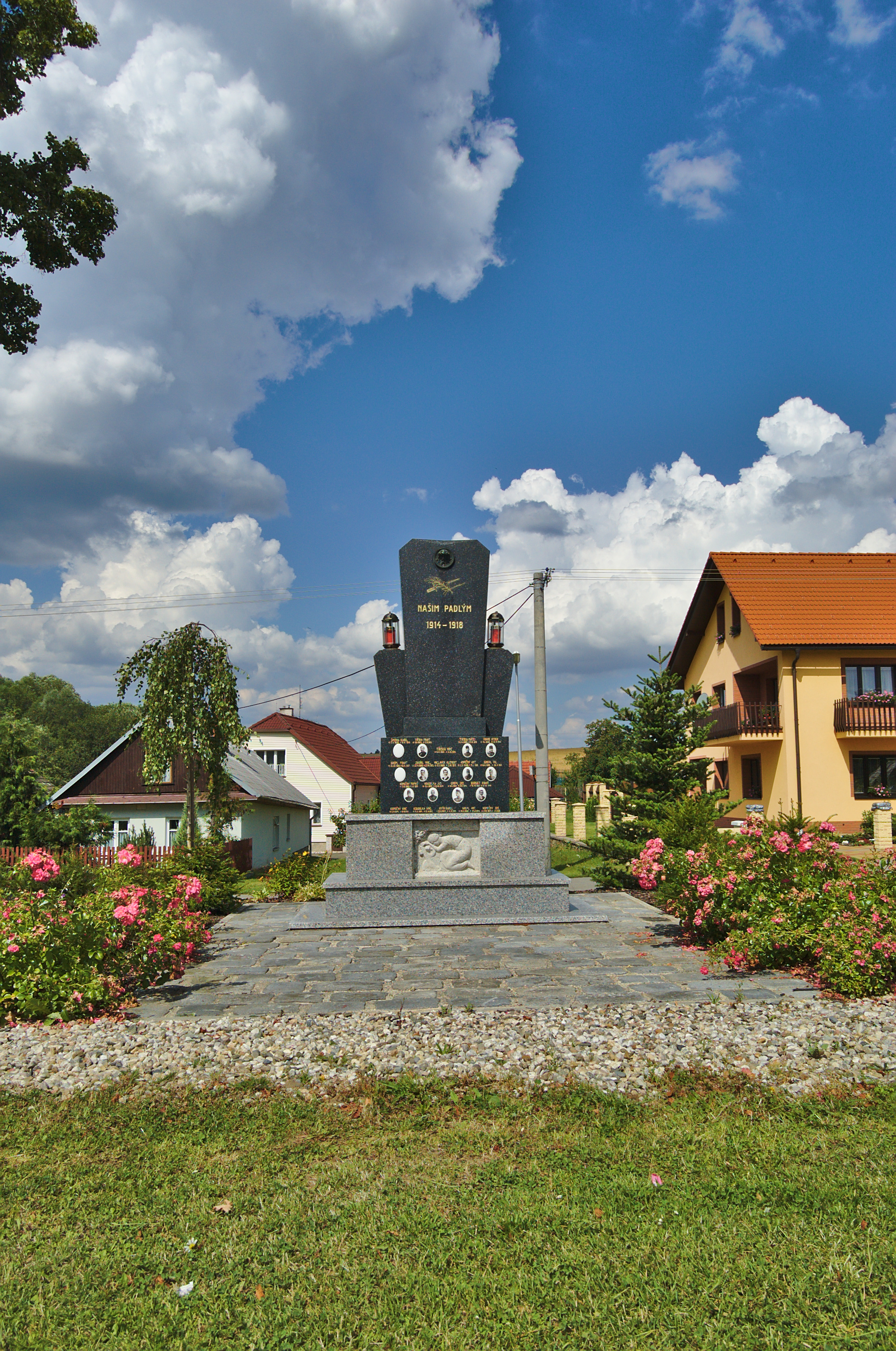 Památník obětem první světové války na Hrochově, Lipová, okres Prostějov